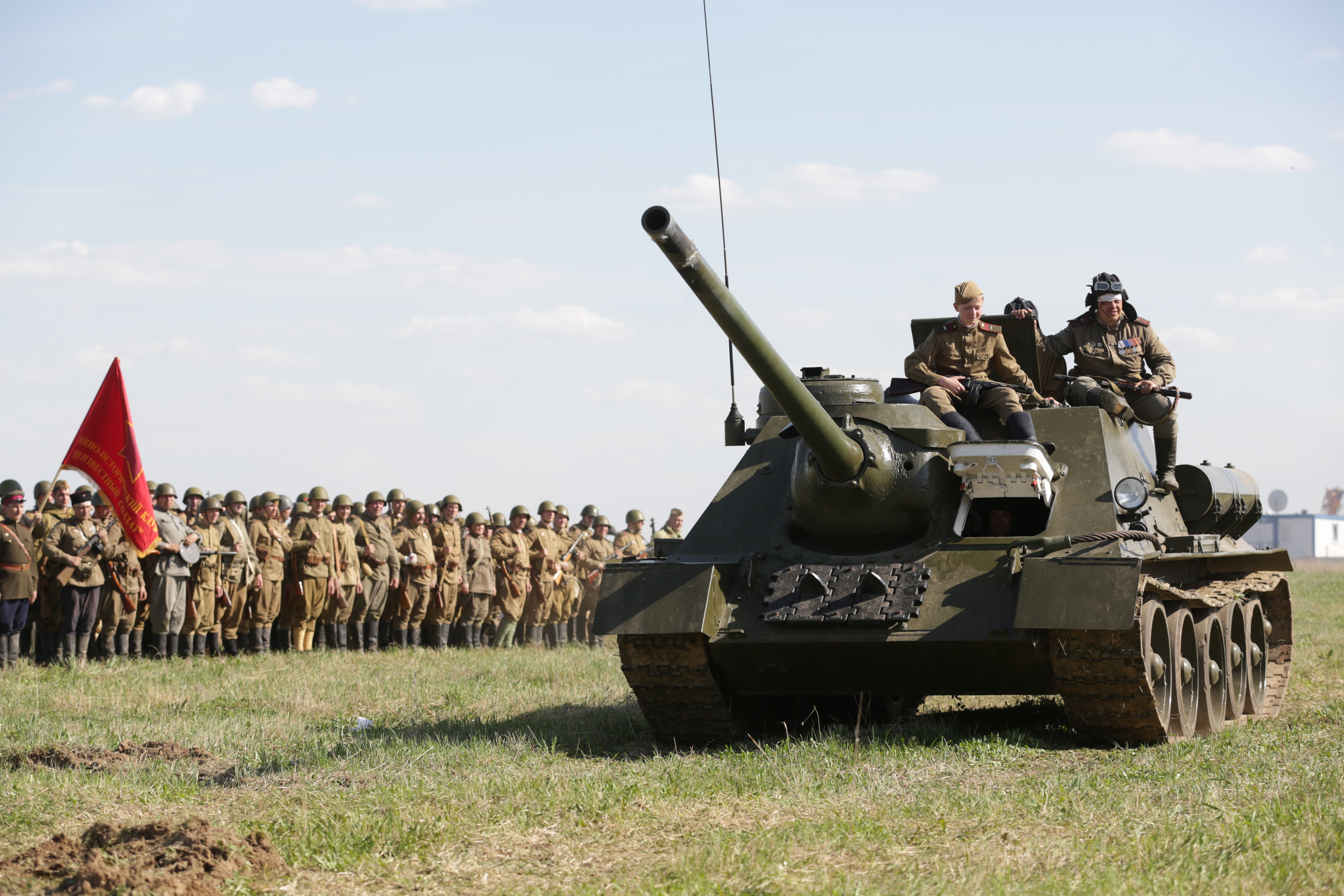 Реконструкция военных действий 1941–1945 на поле возле Музея отечественной военной истории